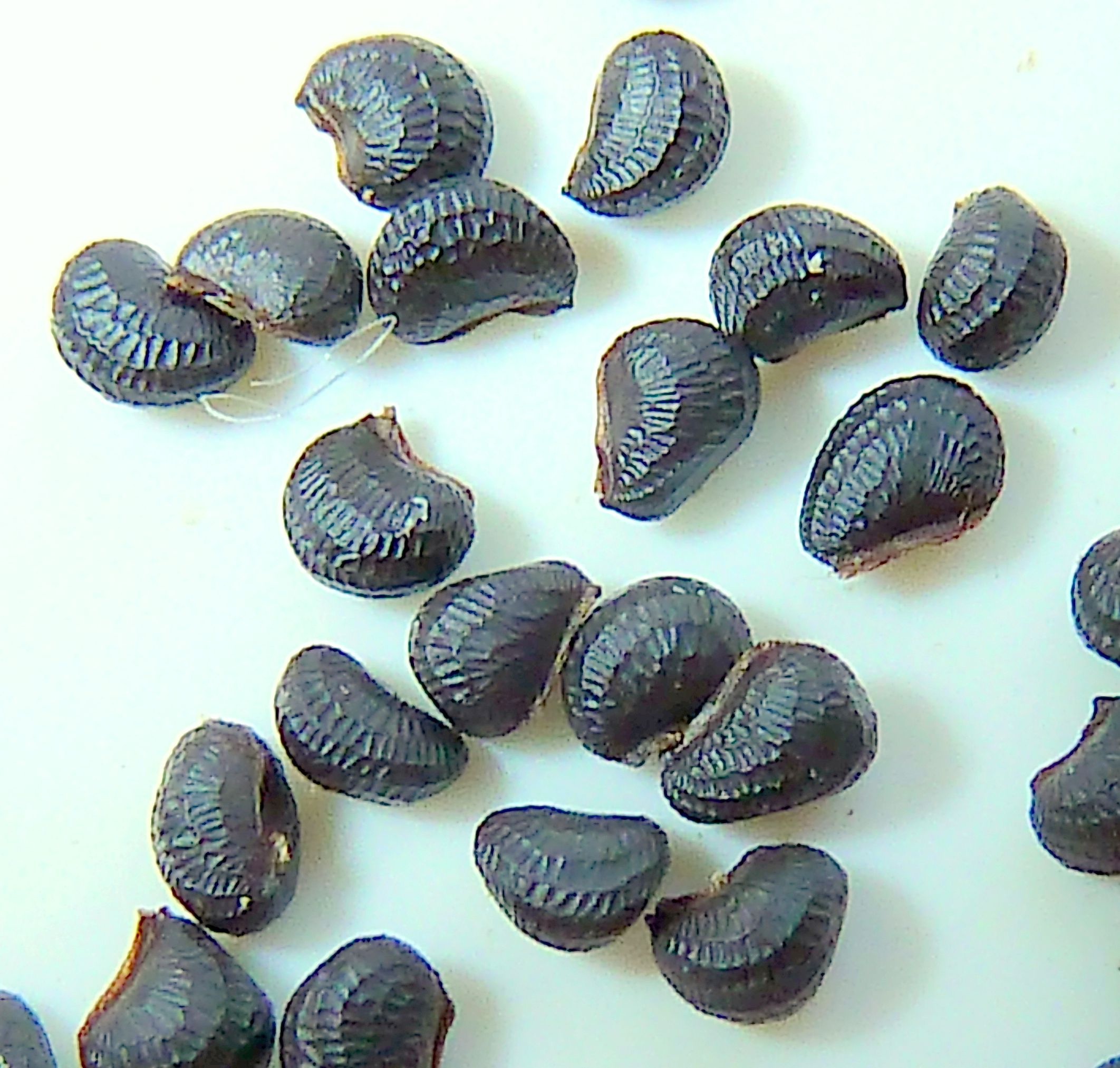 Glaucium flavum (Amapola marina) : semillas - Dique de la Rambla del Cañarete, Águilas (Murcia, España).